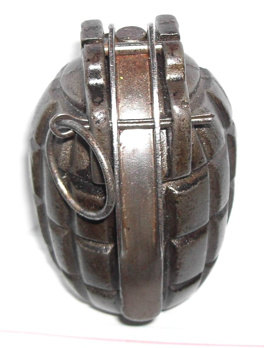 Grenade Mills N°5 Mk II.